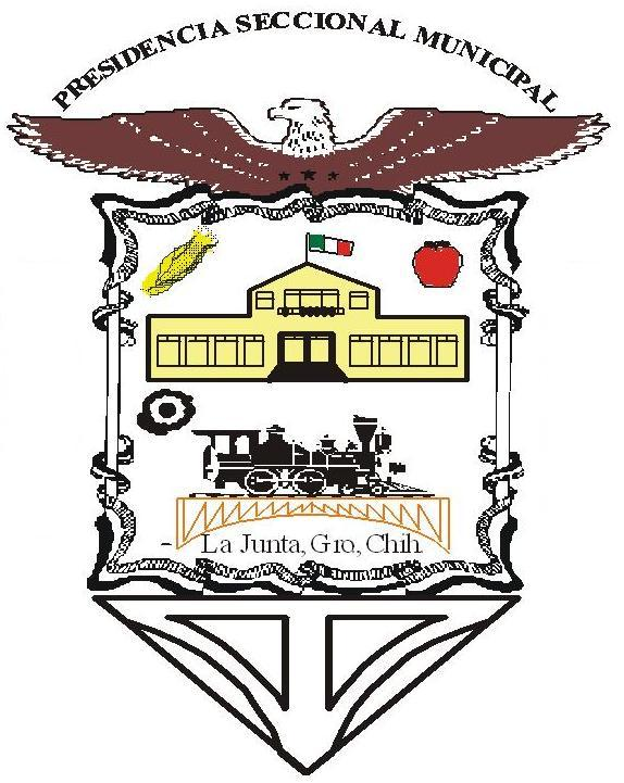 Escudo de la Seccional de La Junta en el Estado de Chihuahua Mexico